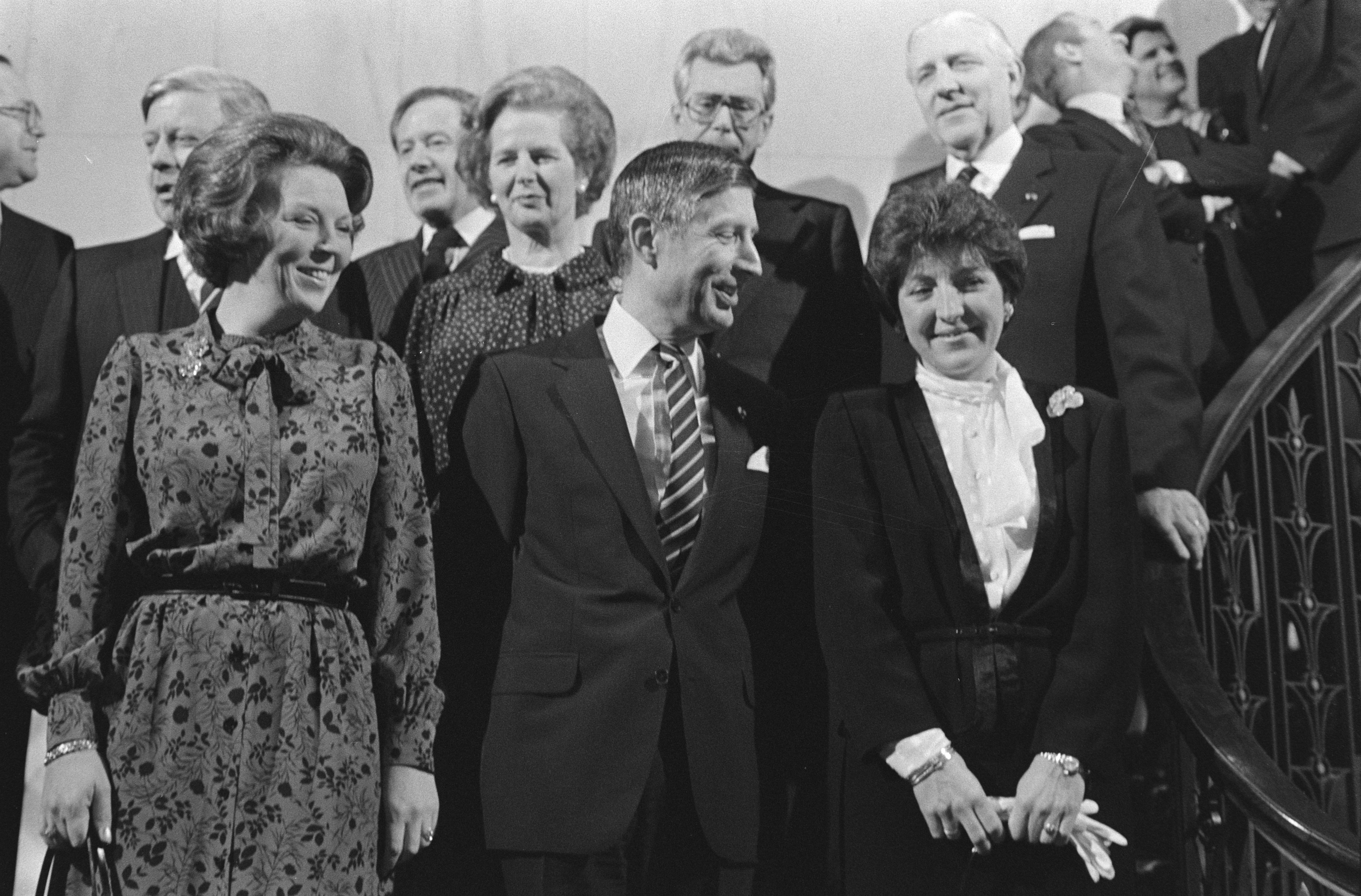 Collectie / Archief : Fotocollectie Anefo Reportage / Serie : [ onbekend ] Beschrijving : Europese Raad in Maastricht, Beatrix temidden van o.a. Giscard DEstaing , Helmut Schmidt , Margaret Thatcher Premier Van Agt en Prinses Margriet Datum : 23 maart 1981 Locatie : Maastricht Trefwoorden : Ontvangsten, koninginnen, premiers, prinsessen Persoonsnaam : Agt, Dries van, Beatrix, prinses, Giscard Destaing, Margriet, prinses, Thatcher, Margaret Fotograaf : Poolfoto Auteursrechthebbende : Nationaal Archief Materiaalsoort : Negatief (zwart/wit) Nummer archiefinventaris : bekijk toegang 2.24.01.05 Bestanddeelnummer : 931-3893